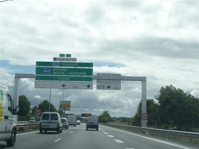 Rocade Exterieur de Bordeaux a la sortie 12